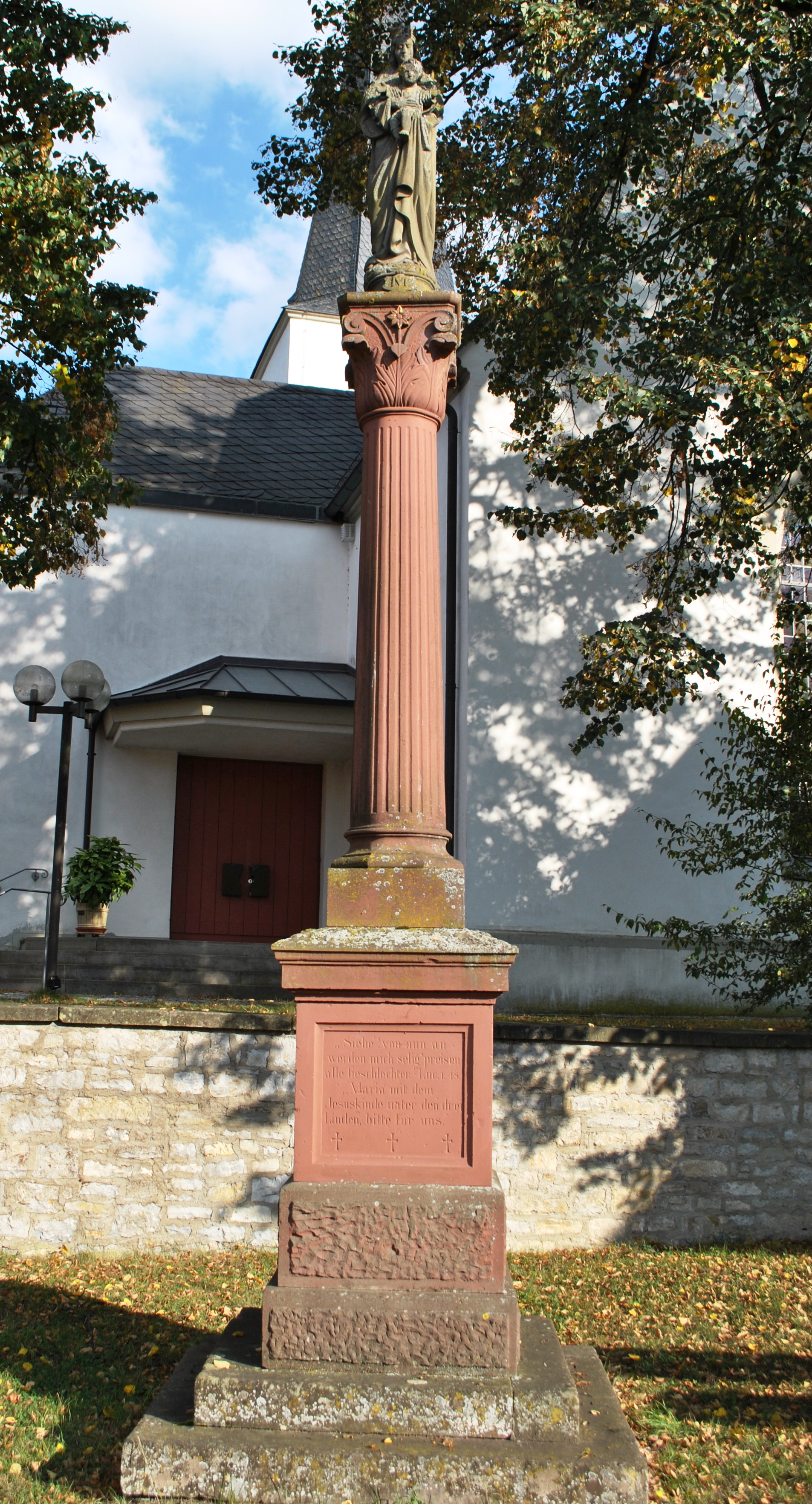 Kriegerdenkmal Mariensäule, zweite Hälfte 19. Jahrhundert